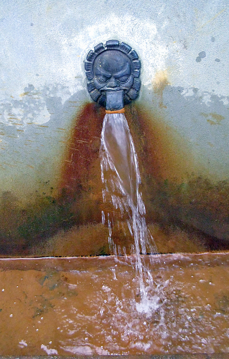 Arnakkekilden